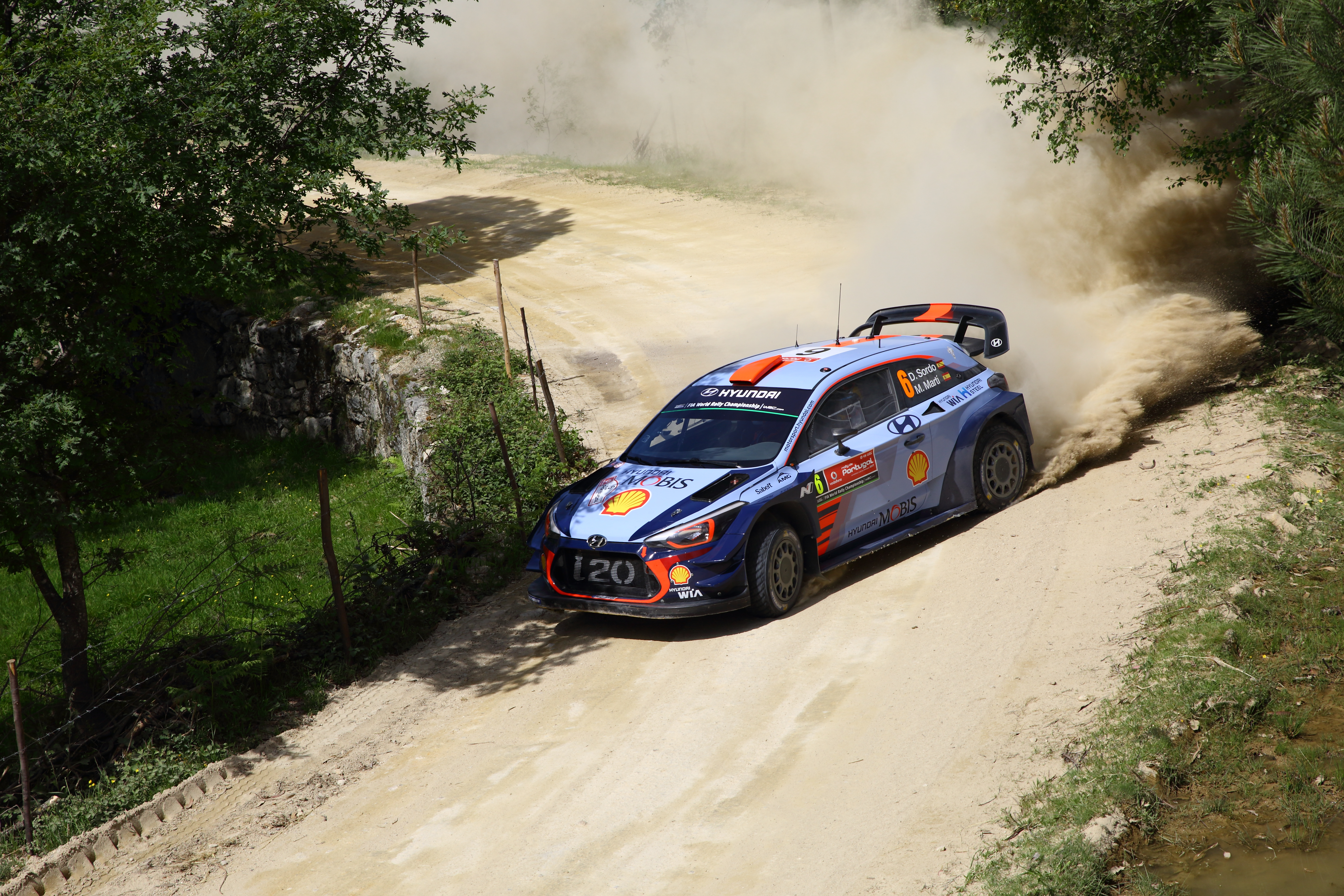 2017 Rally de Portugal